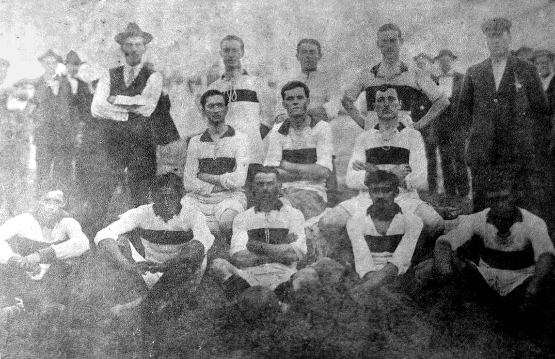 Primer equipo fotografiado del Club Atlético Platense.